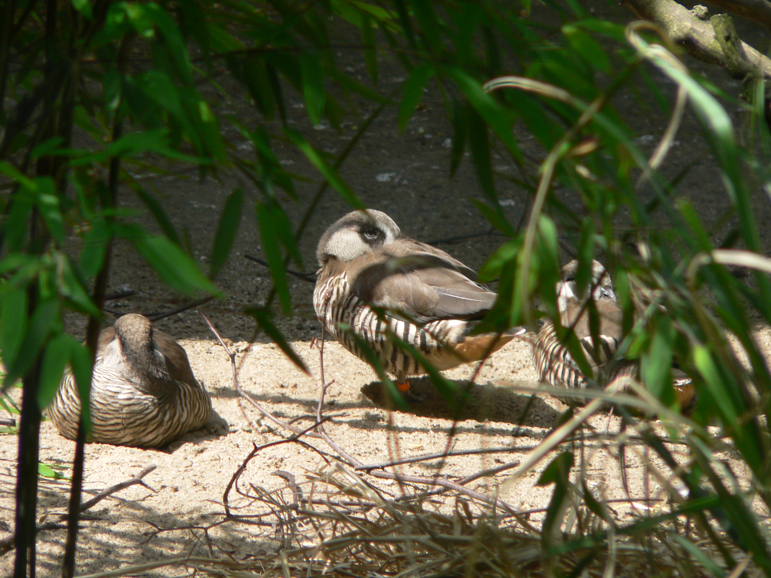 Spatelschnabelente, Canard à oreilles roses